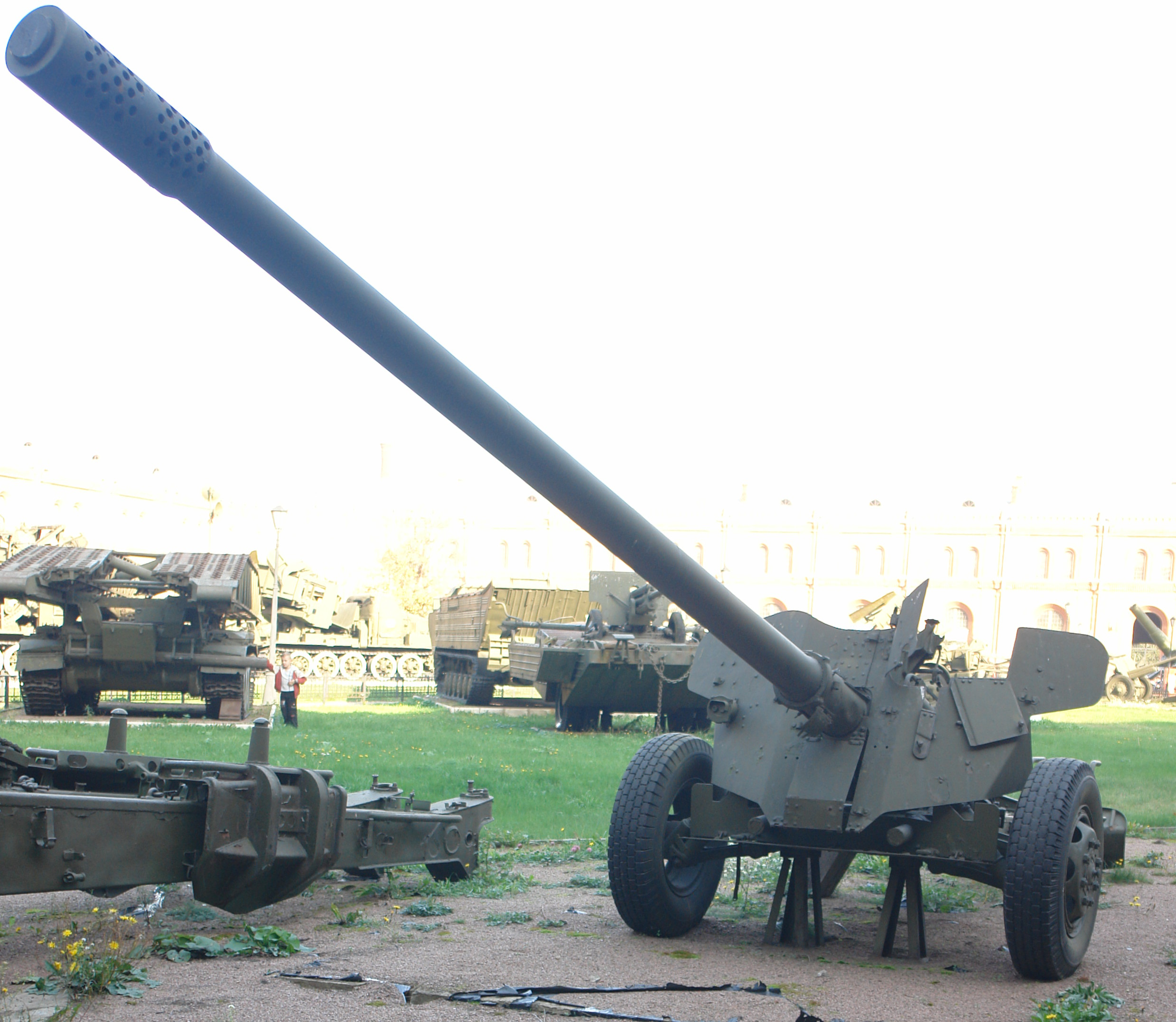 100-мм ПРОТИВОТАНКОВАЯ ПУШКА МТ-12(2А29) ПРИНЯТА НА ВООРУЖЕНИЕ В 1968 г. ГЛАВНЫЙ КОНСТРУКТОР Г.И.ЛУКЬЯНЧЕНКО. ДАЛЬНОСТЬ, М: СТРЕЛЬБЫ-8200, ПРЯМОГО ВЫСТРЕЛА - 1880. СКОРОСТРЕЛЬНОСТЬ - ДО 14 ВЫСТР/МИН МАССА ОРУДИЯ-3100. РАСЧЕТ 7 человек Военно-исторический музей артиллерии, инженерных войск и войск связи, Санкт-Петербург.